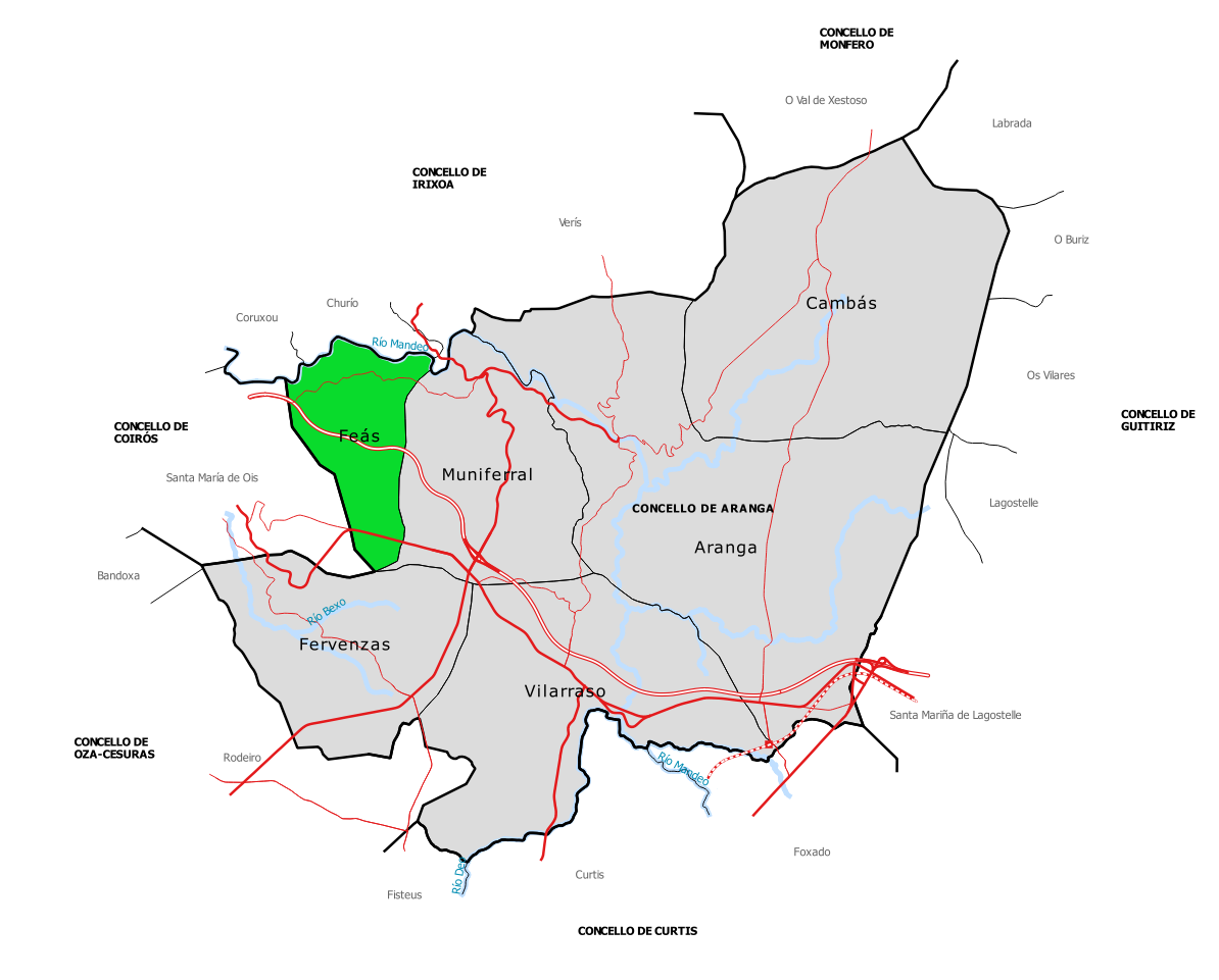 Mapa da parroquia de Feás no concello de Aranga (Galiza).